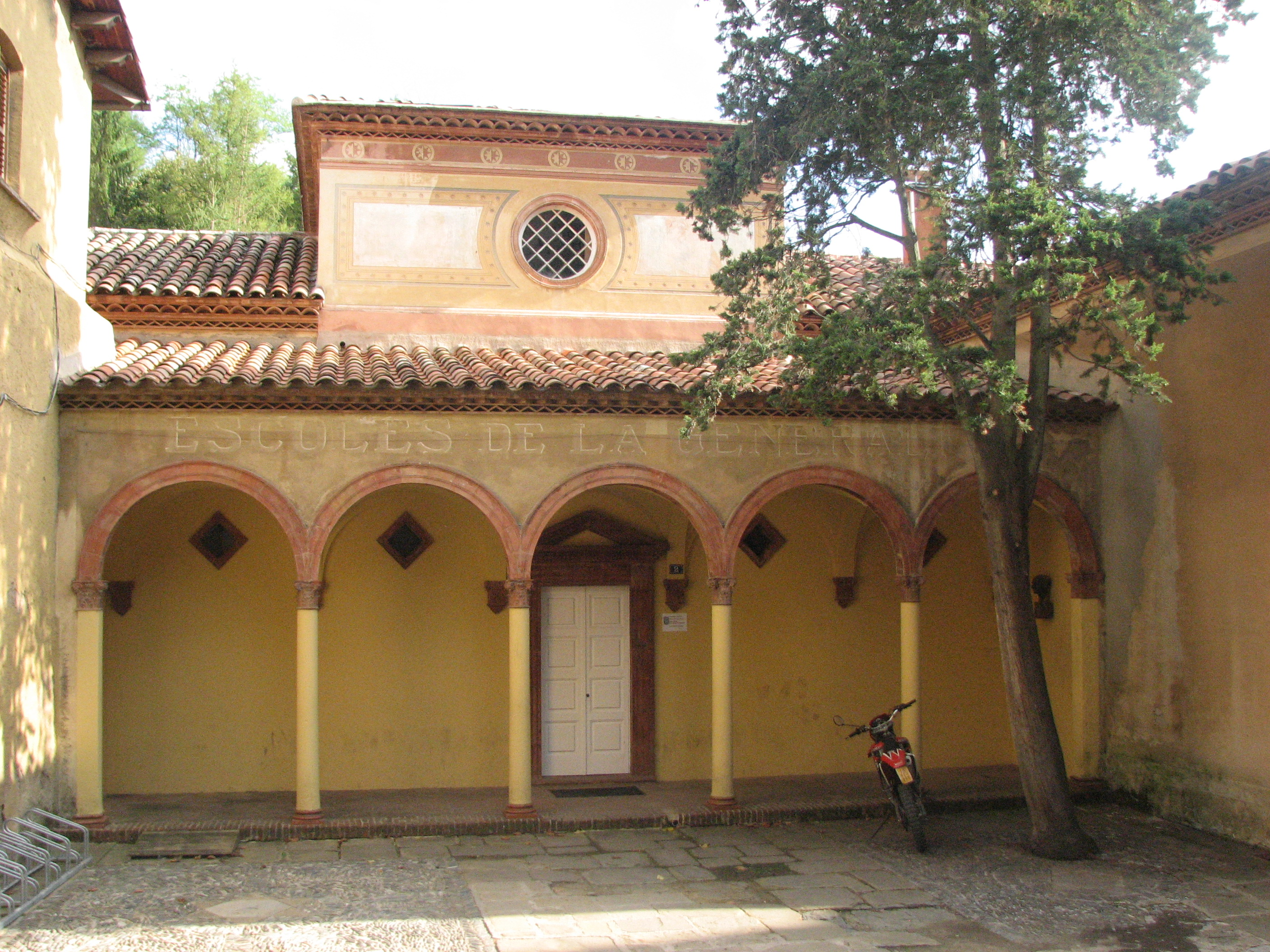 Escola de les Germanes Carmelites (Sant Joan de les Abadesses)